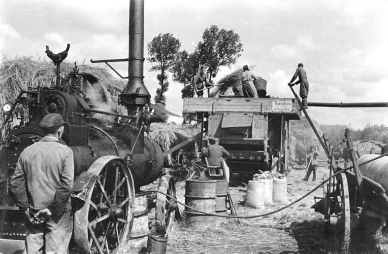 Gemeinde Dermsdorf, Getreidedreschplatz Zentralbild Wittig (BD) 20.7.1953 Vorbildlicher Druschplatz der VdgB Dermsdorf Kreis Erfurt Die werktätigen Einzelbauern der Gemeinde Dermsdorf schlossen sich in der Vereinigung der gegenseitigen Bauernhilfe (Bäuerliche Handelsgenossenschaft) zur Druschgemeinschaft zusammen. Am Ortsrand wurde ein vorbildlicher Druschplatz geschaffen. UBz: Drusch der letzten Winterölfrucht.